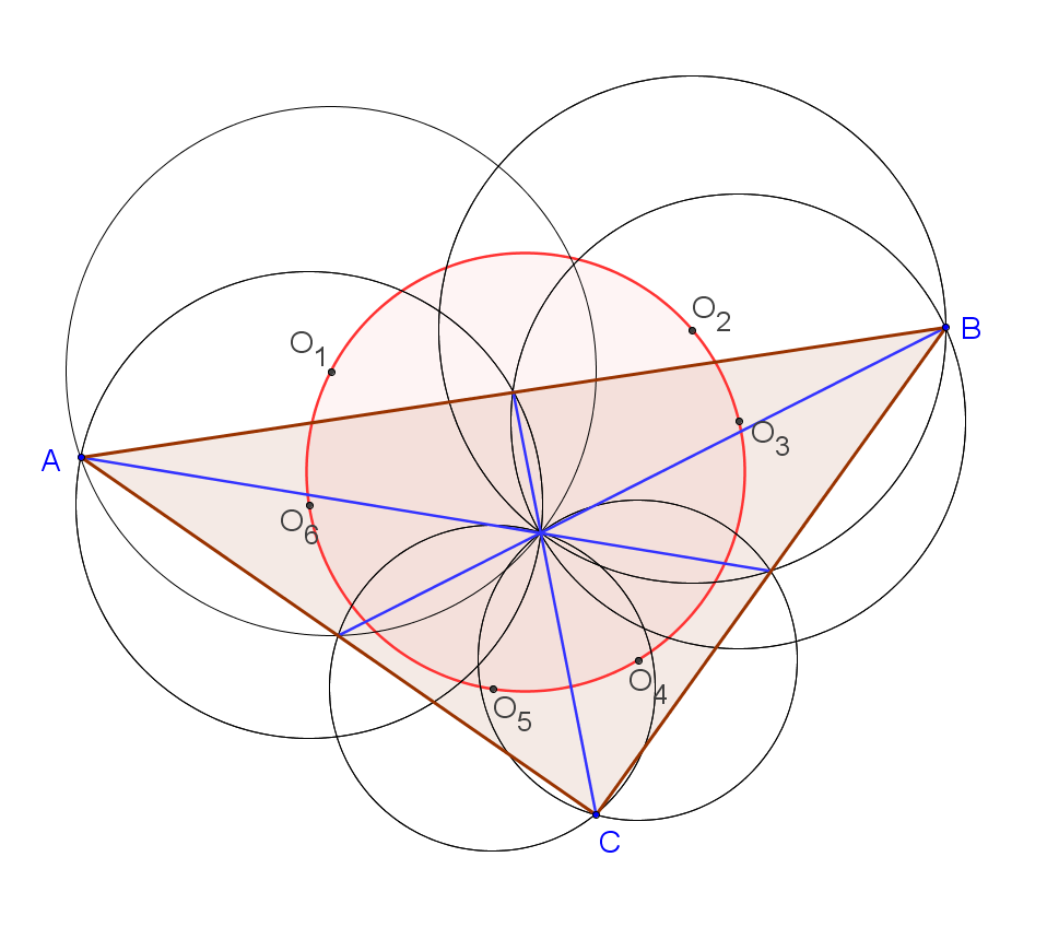 файл создан в среде GeoGebra